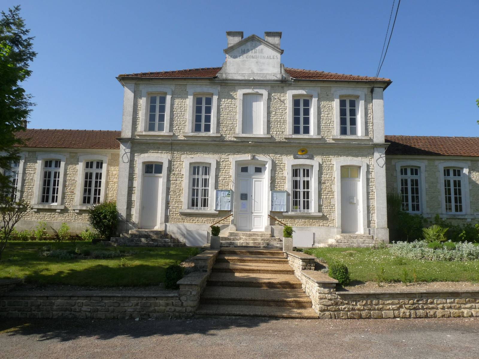 Mairie de Xambes, Charente, France